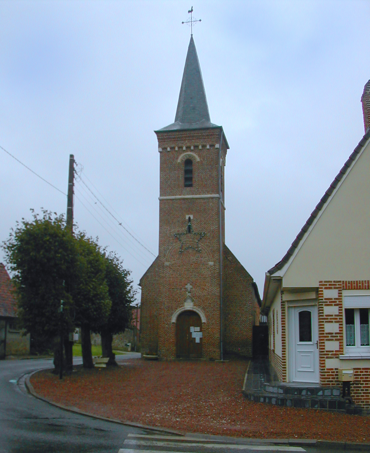 L'église de Ruisseauville.